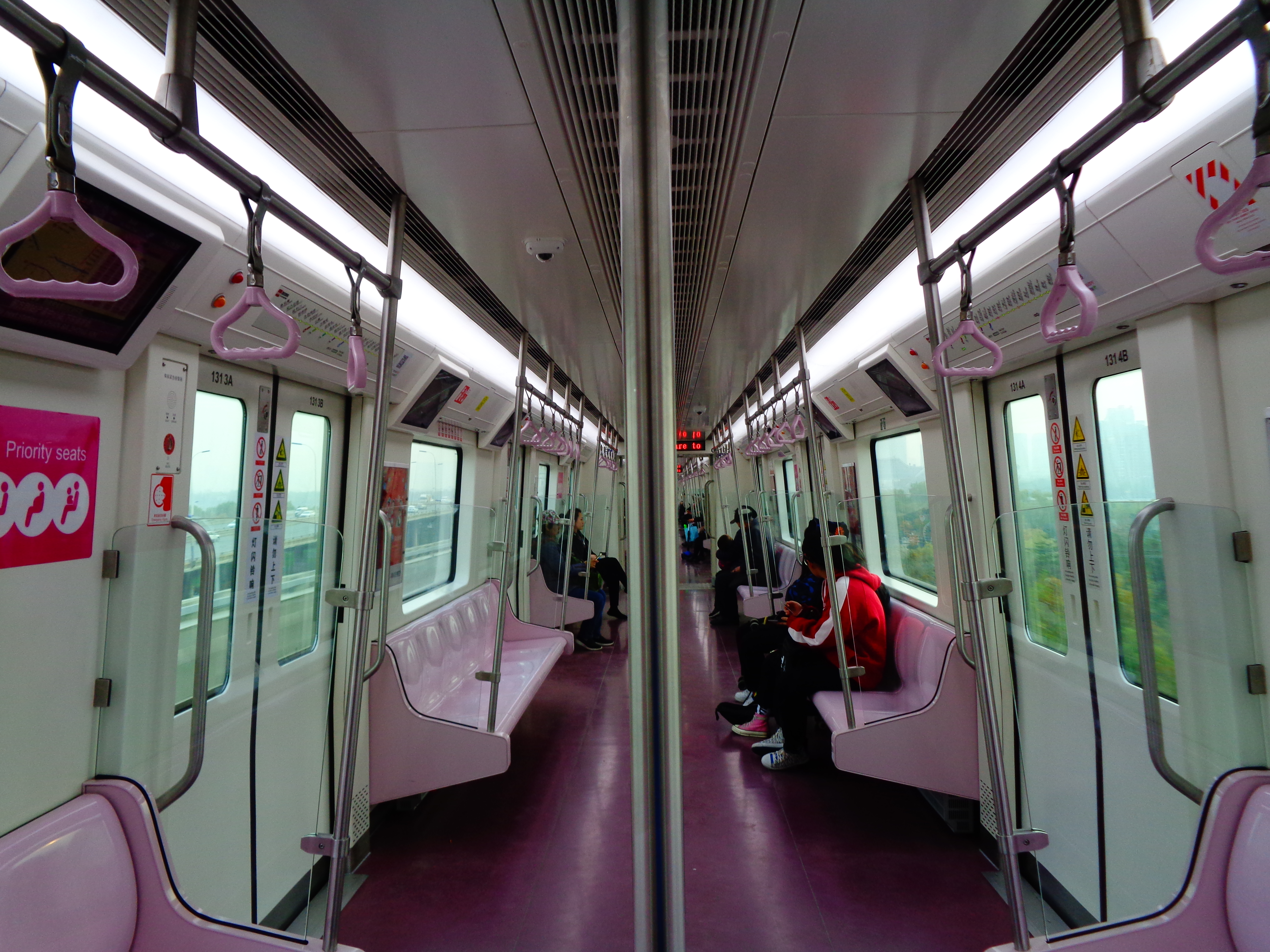 在西安市灞桥区地铁香湖湾站以南的列车上注视